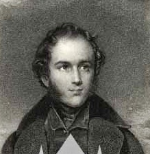 Erbprinz Constantin Joseph zu Löwenstein-Wertheim-Rosenberg